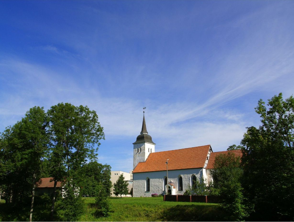 Viljandi Estonia